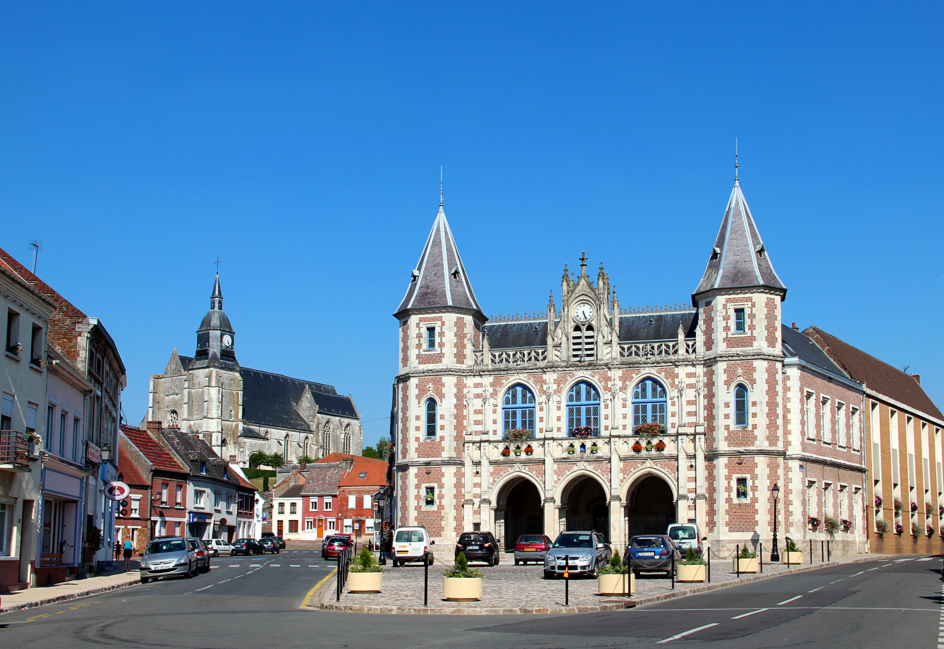 Auxi-le-Château (Pas-de-Calais) - France, l'hôtel de ville (1860) et l'église Saint-Martin (XVIe siècle).